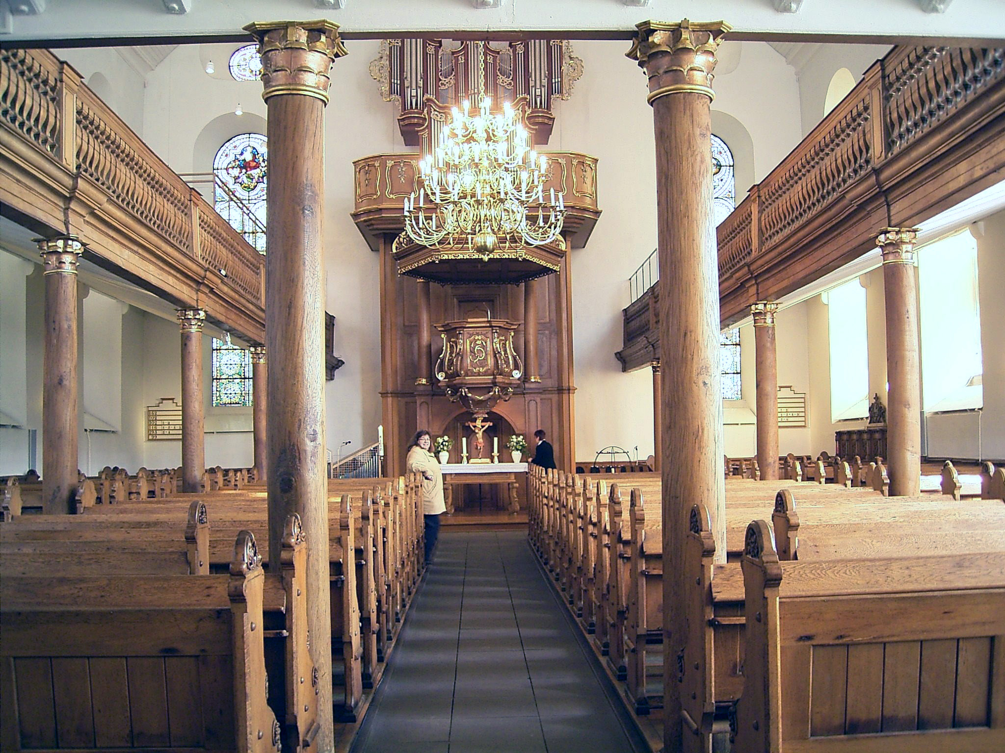 Evangelische Stadtkirche in der Altstadt von Remscheid-Lennep